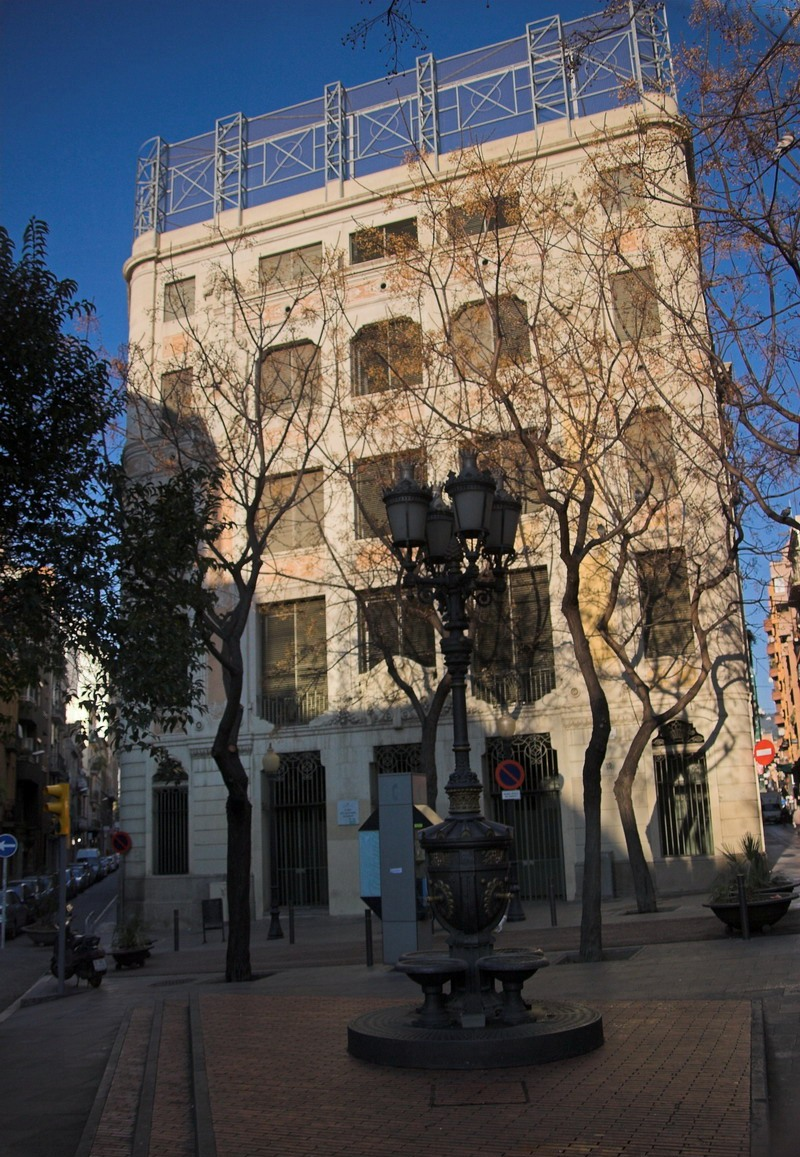 Forn Sant Jaume (Barcelona-Catalunya), obra de Joaquim Raspall 1922. Placeta Sant Miquel. Actualment és un IES.